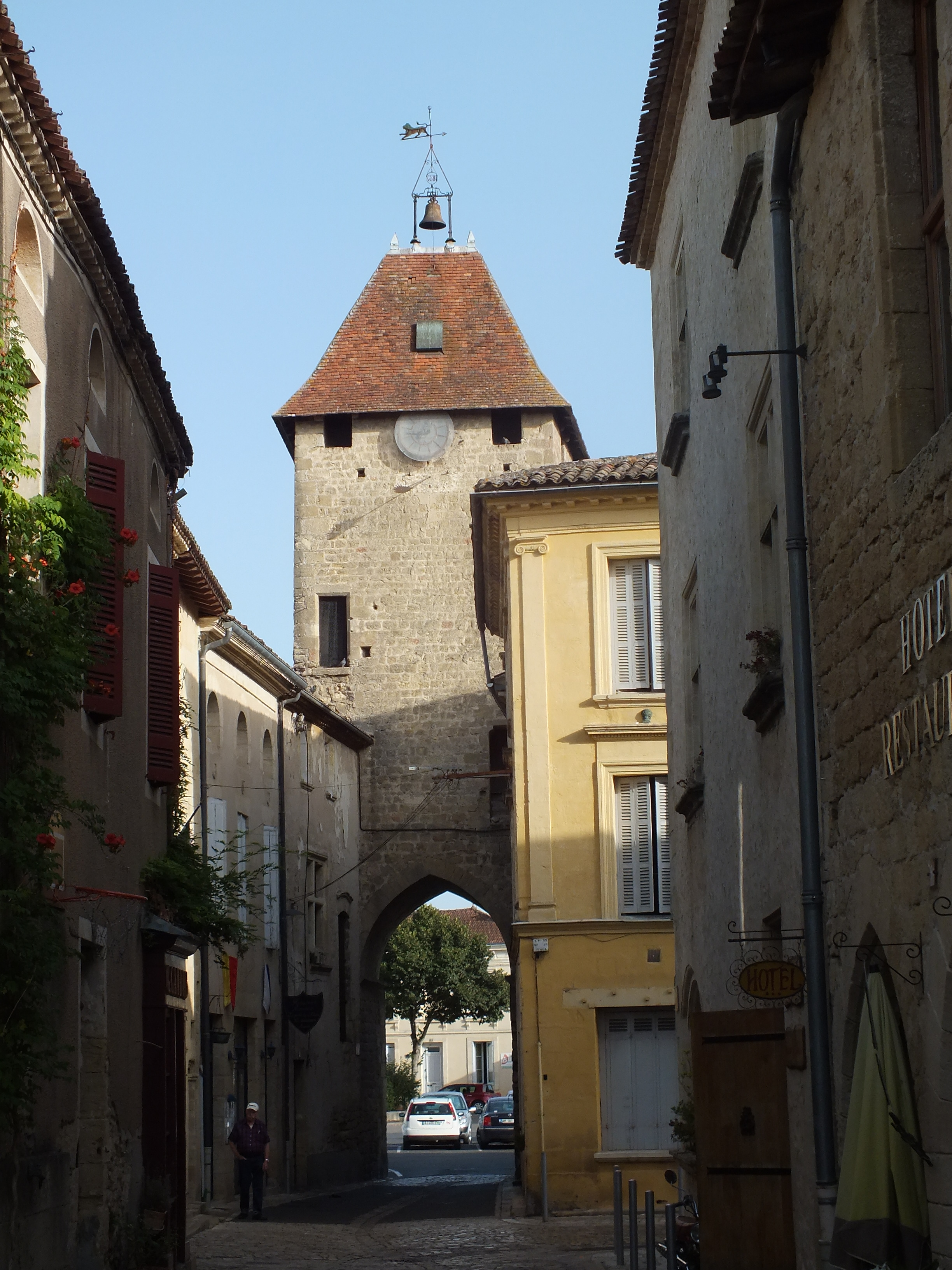 Porte de Benauge, enceinte de Saint-Macaire, vue de la rue de l'église .